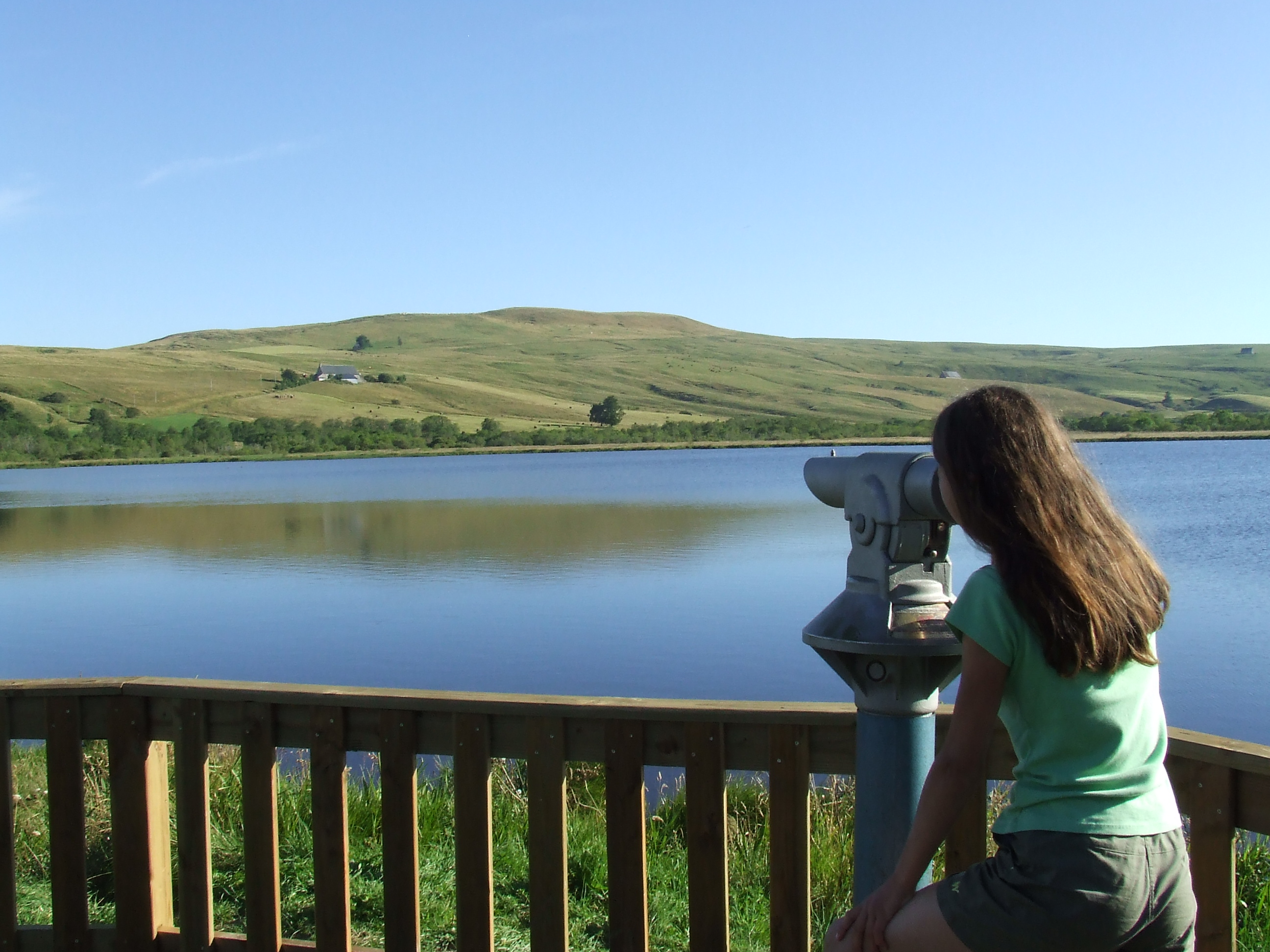 aire d'observation des oiseaux de la réserve naturelle des Sagnes de la Godivelle, département du Puy-de-Dôme, Auvergne.